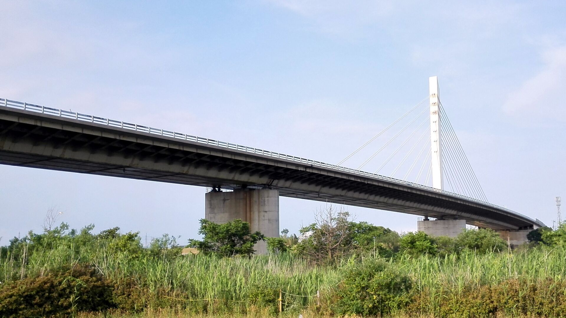 上流側から撮影